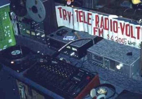 Adesivi Radio | Adesivi Radio Voltri Uno ! Foto studio Radio Voltri Uno